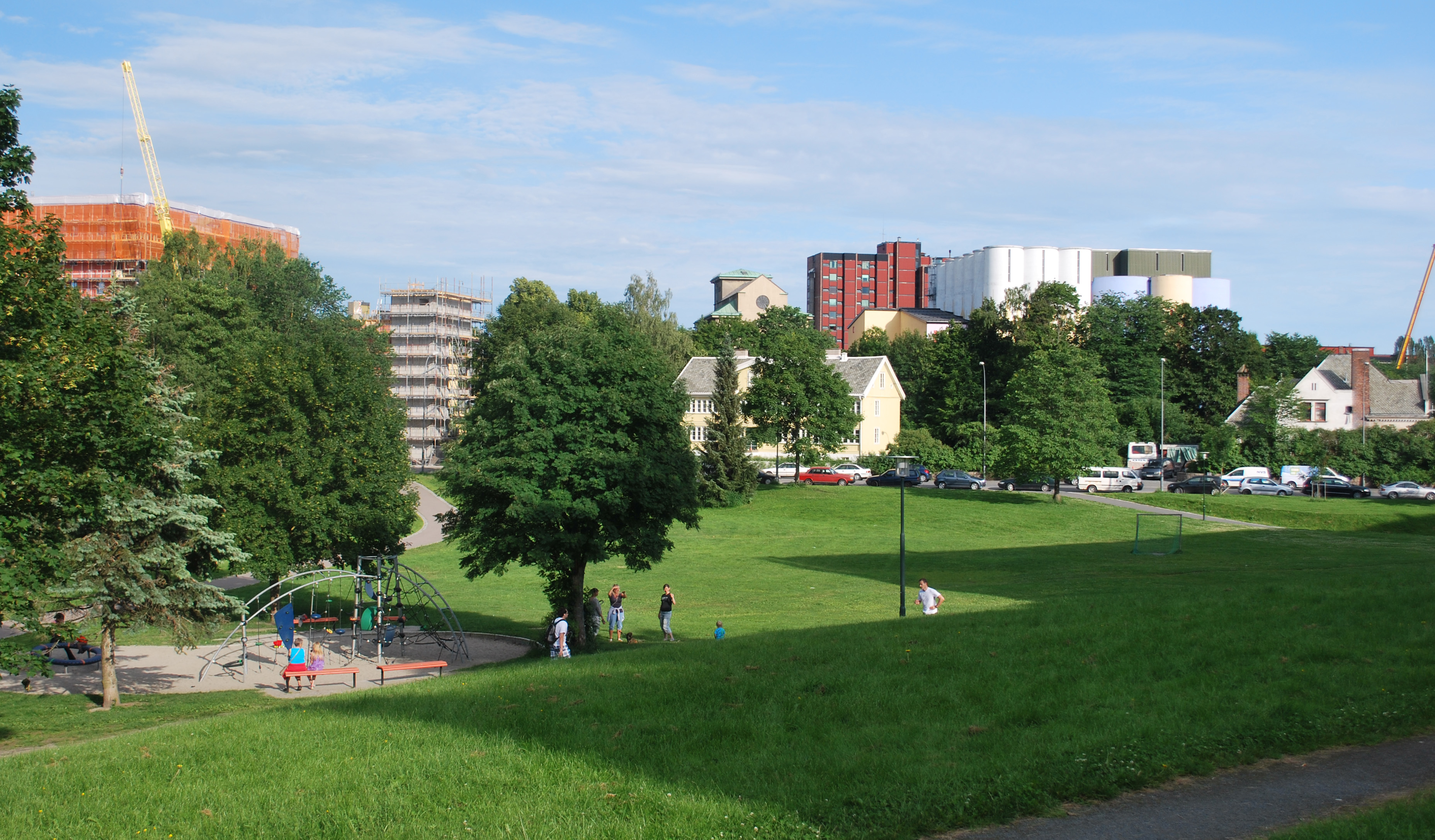 Heftyeløkka ved Akerselva på Bjølsen. Høy rød bygning er Sandakersenteret